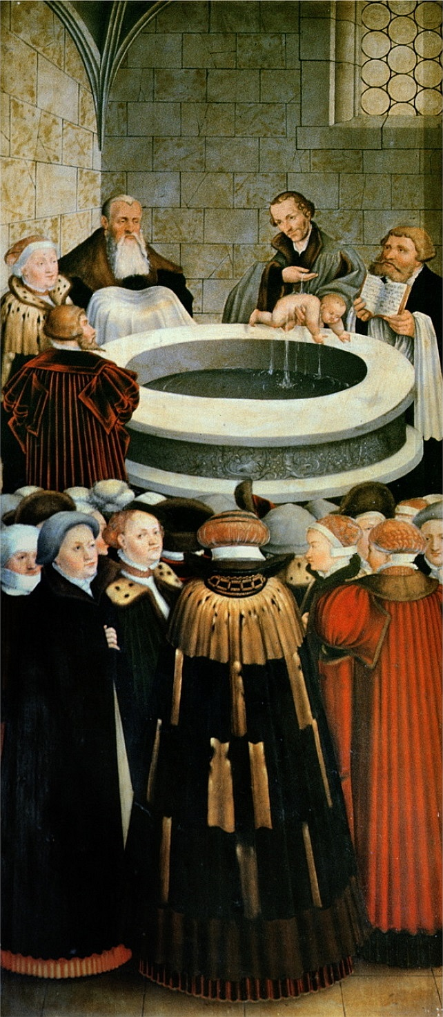 Reformation altarpiece, Stadt- und Pfarrkirche St. Marien zu Wittenberg, left wing